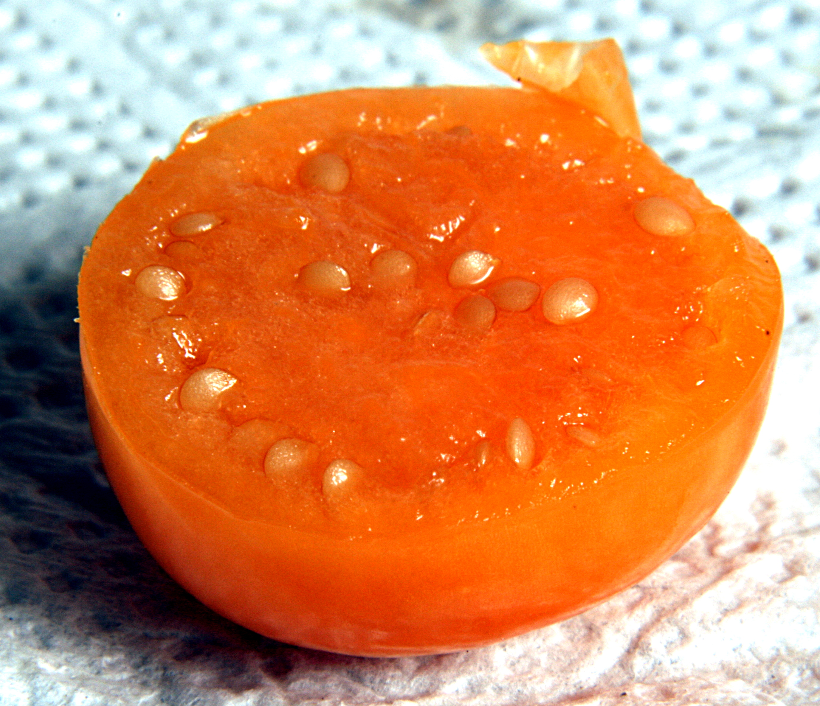 Physalishälfte_Kolumbien